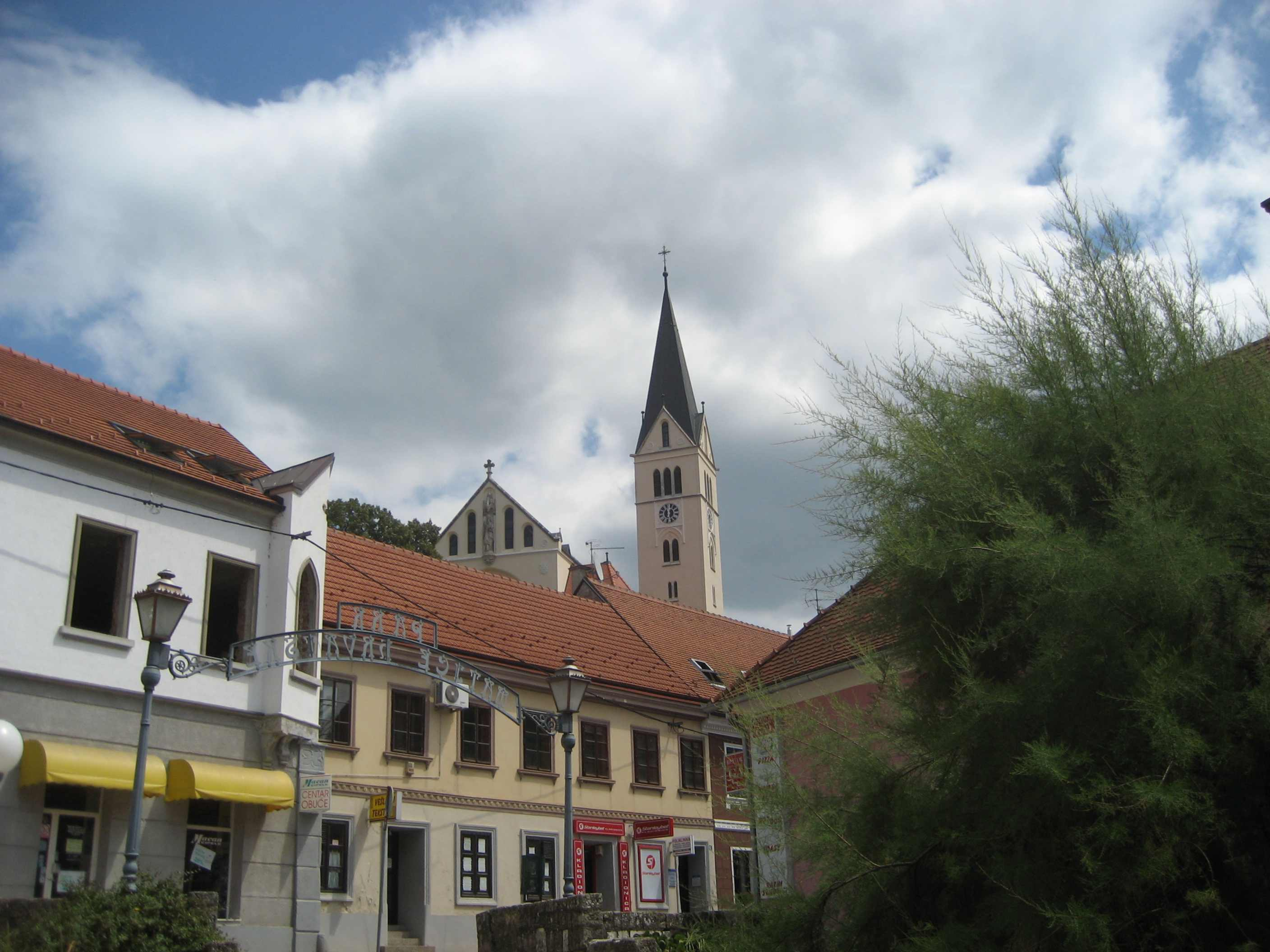 Krapina, Croatia